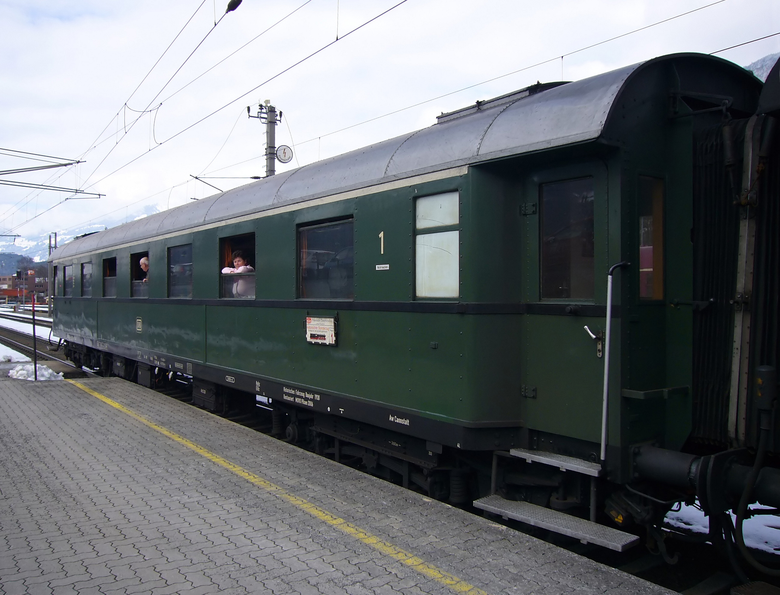 Schnellzugwagen Bauart 28 in bludenz